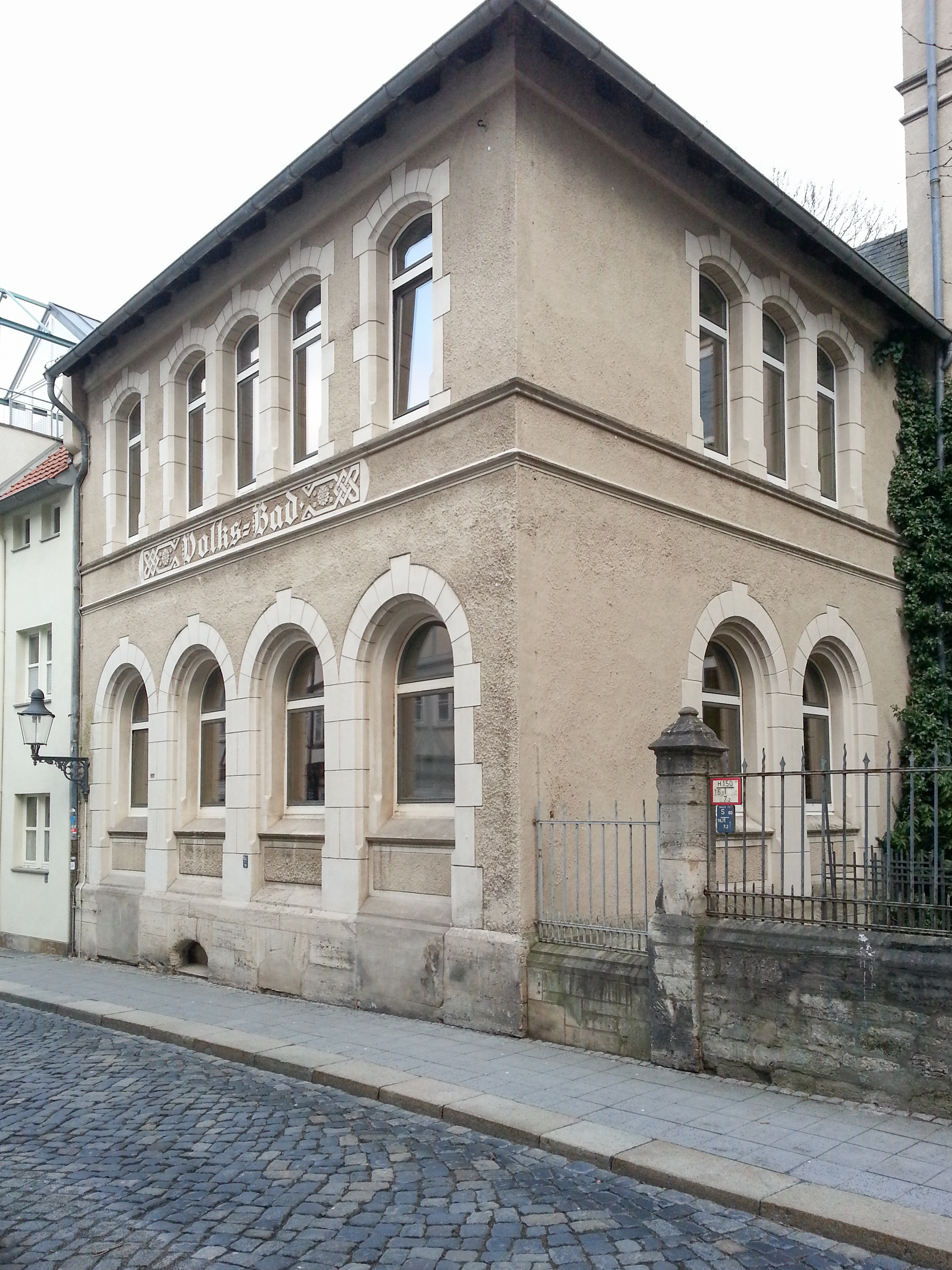 Ehemaliges Volksbad in der Ritterstraße. Heute zur Gaußschule gehörig.